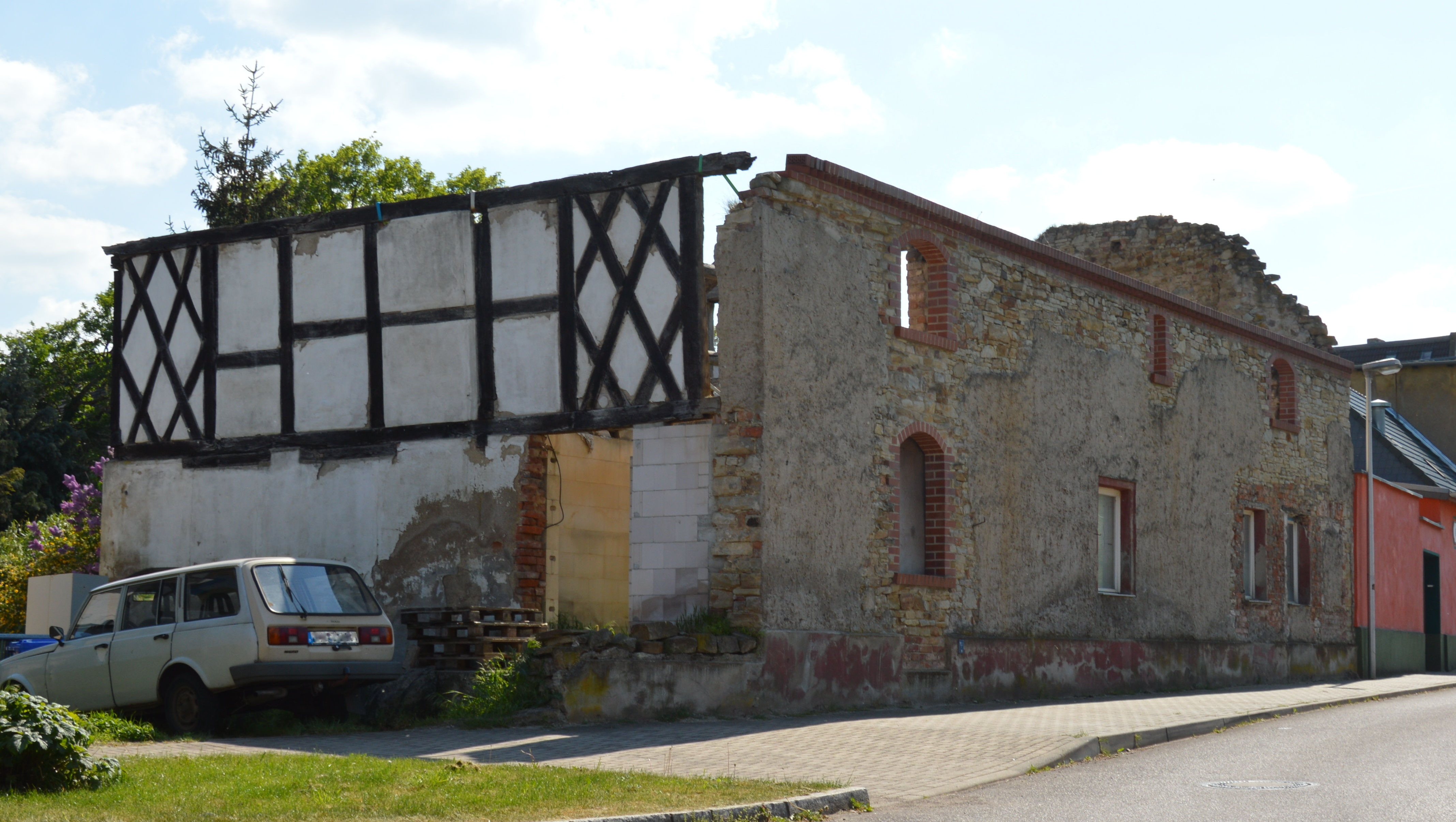 Haus Kieler Straße 9 in Magdeburg